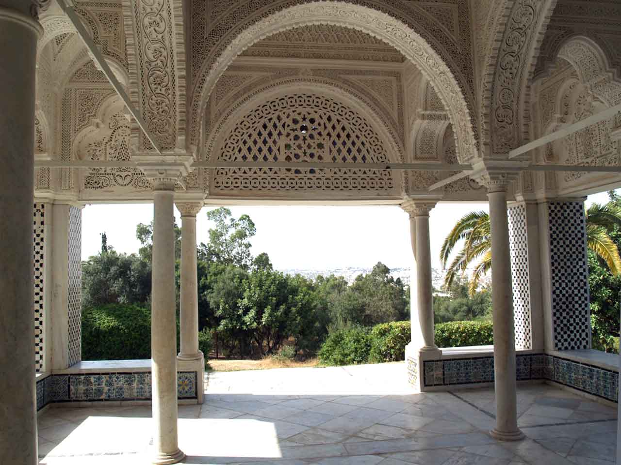 Vue vers Tunis en 2006 Bertrand Bouret